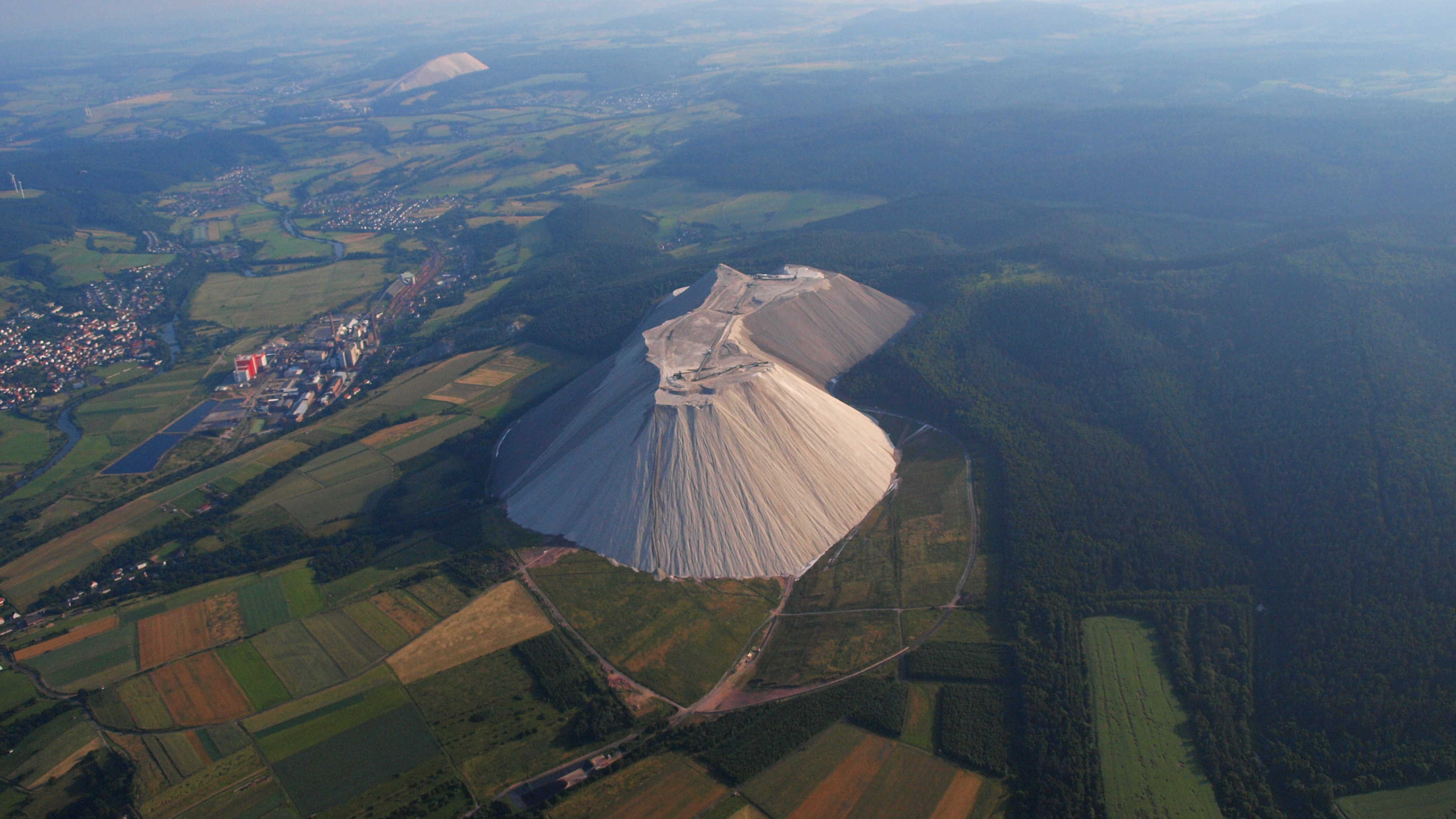 Heringen (Werra) – Monte Kali, im Hintergrund die Halde bei Philippsthal